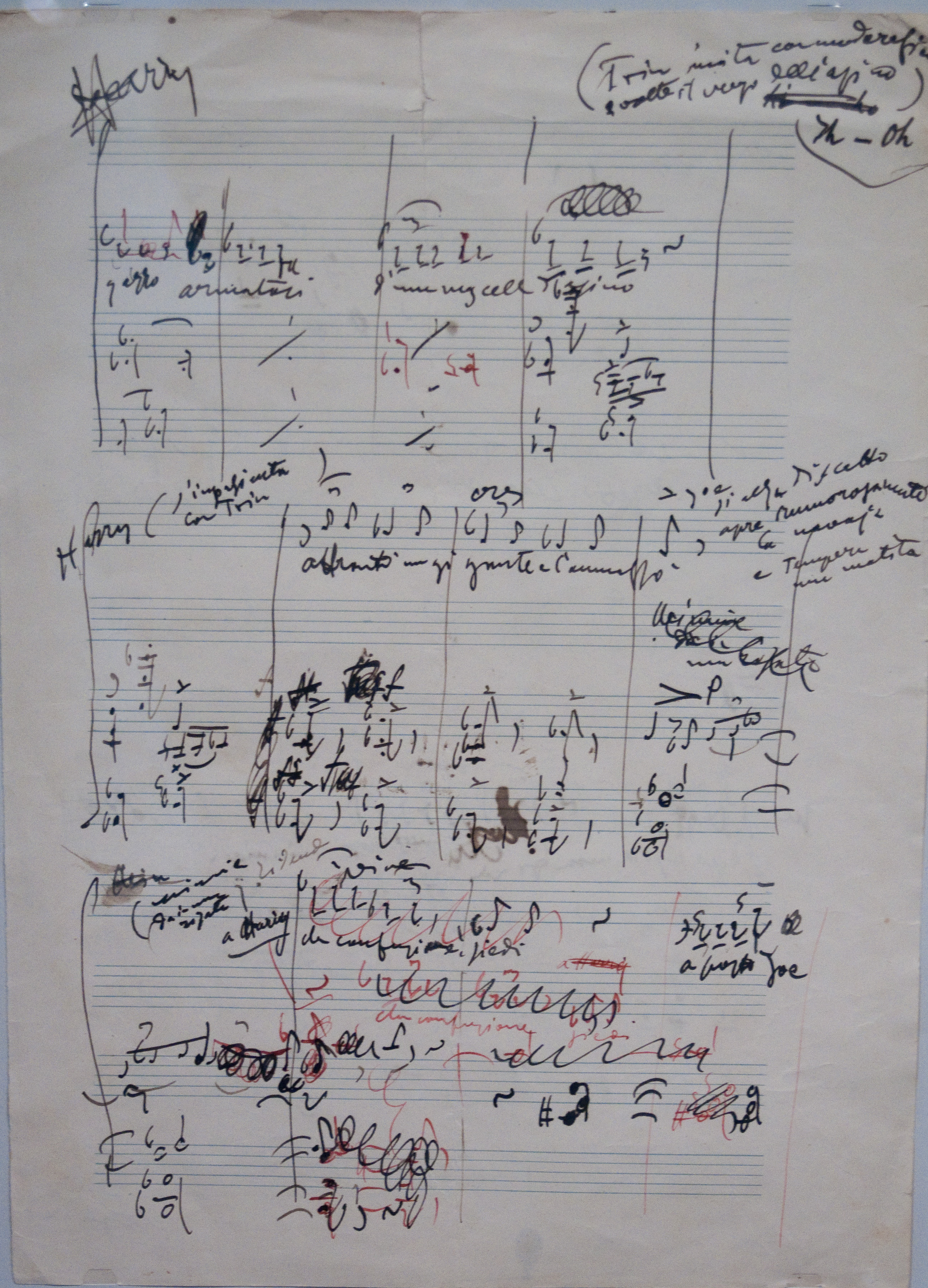 Manuscrit du premier acte de La fanciulla del West annoté par Puccini, mars-avril 1908, Musée des lettres et manuscrits, Paris.